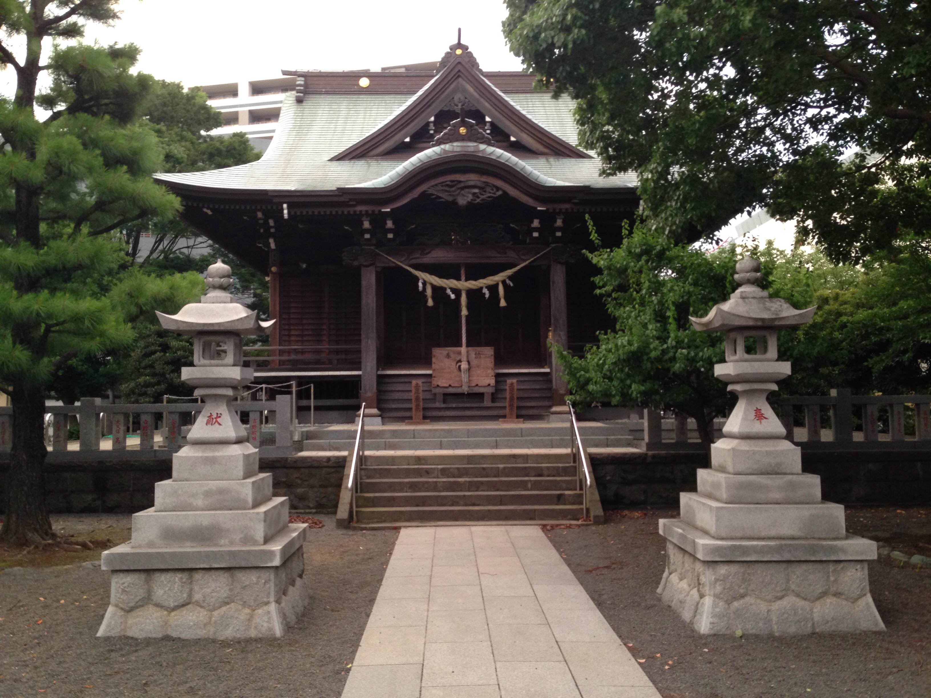 横浜市都筑区中川にある杉山神社の拝殿。